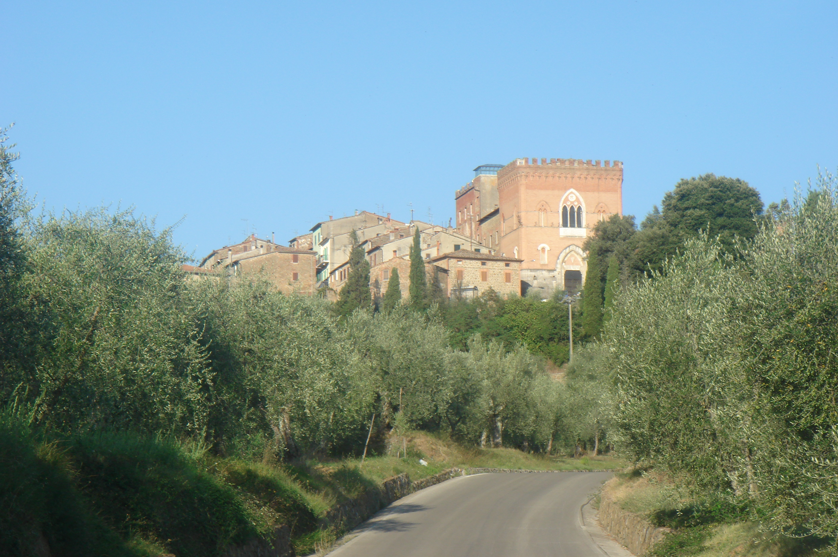 Panorama di Farnetella (Siena)